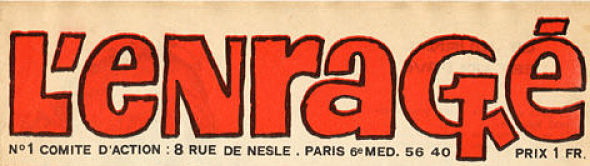 Manchette de L'Enragé, journal satirique fondé au début de Mai 1968 par Jean-Jacques Pauvert.